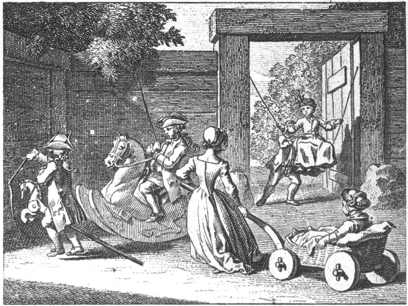 Vergnügungen der Kinder. b) Der Steckenreiter. Der auf dem Schaukelpferde. Der Kinderwagen. Das Schaukeln im Seile. (Beschreibung lt. Quelle)